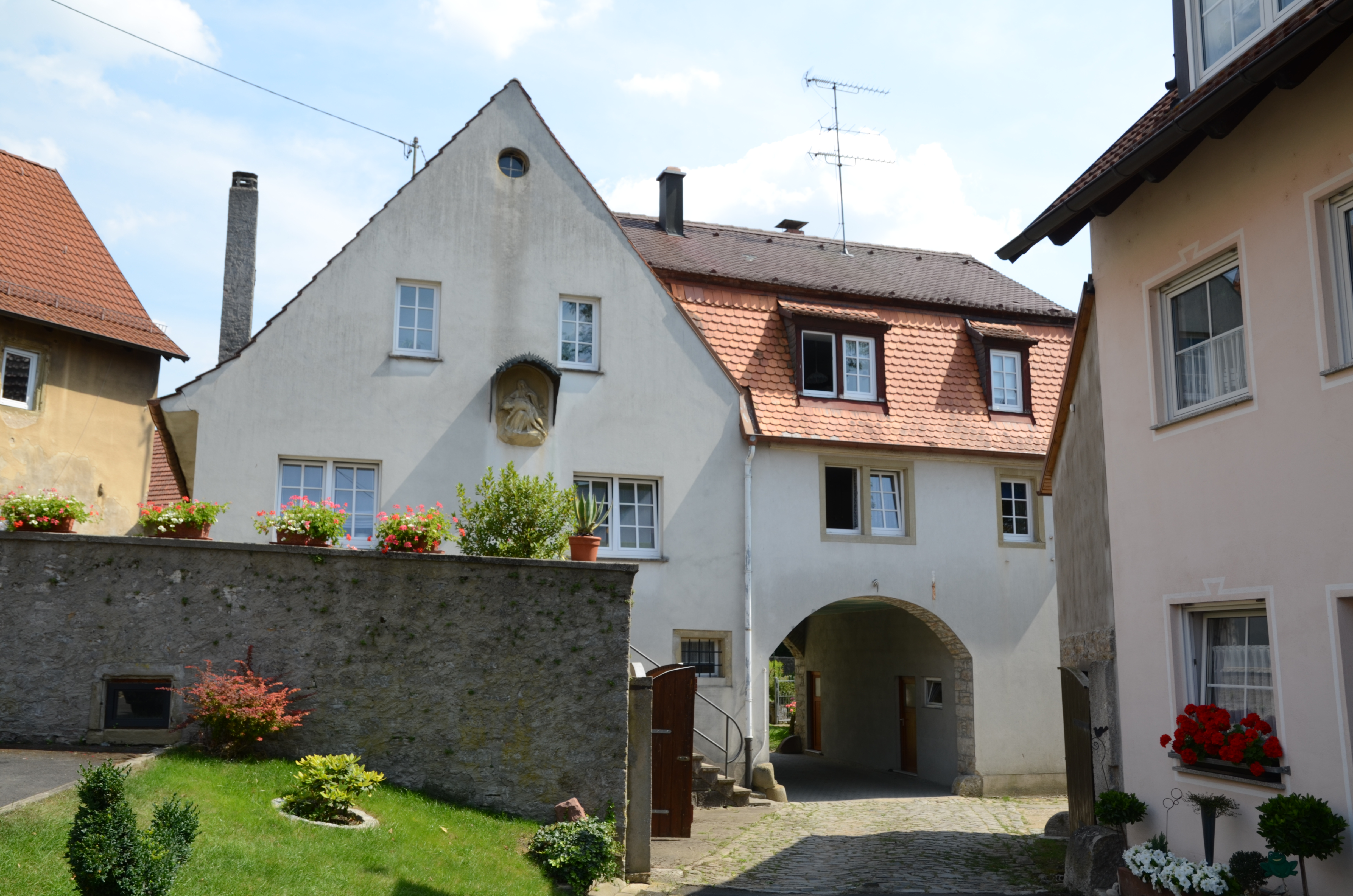 Maidbronn, ehemalige Klostermühle